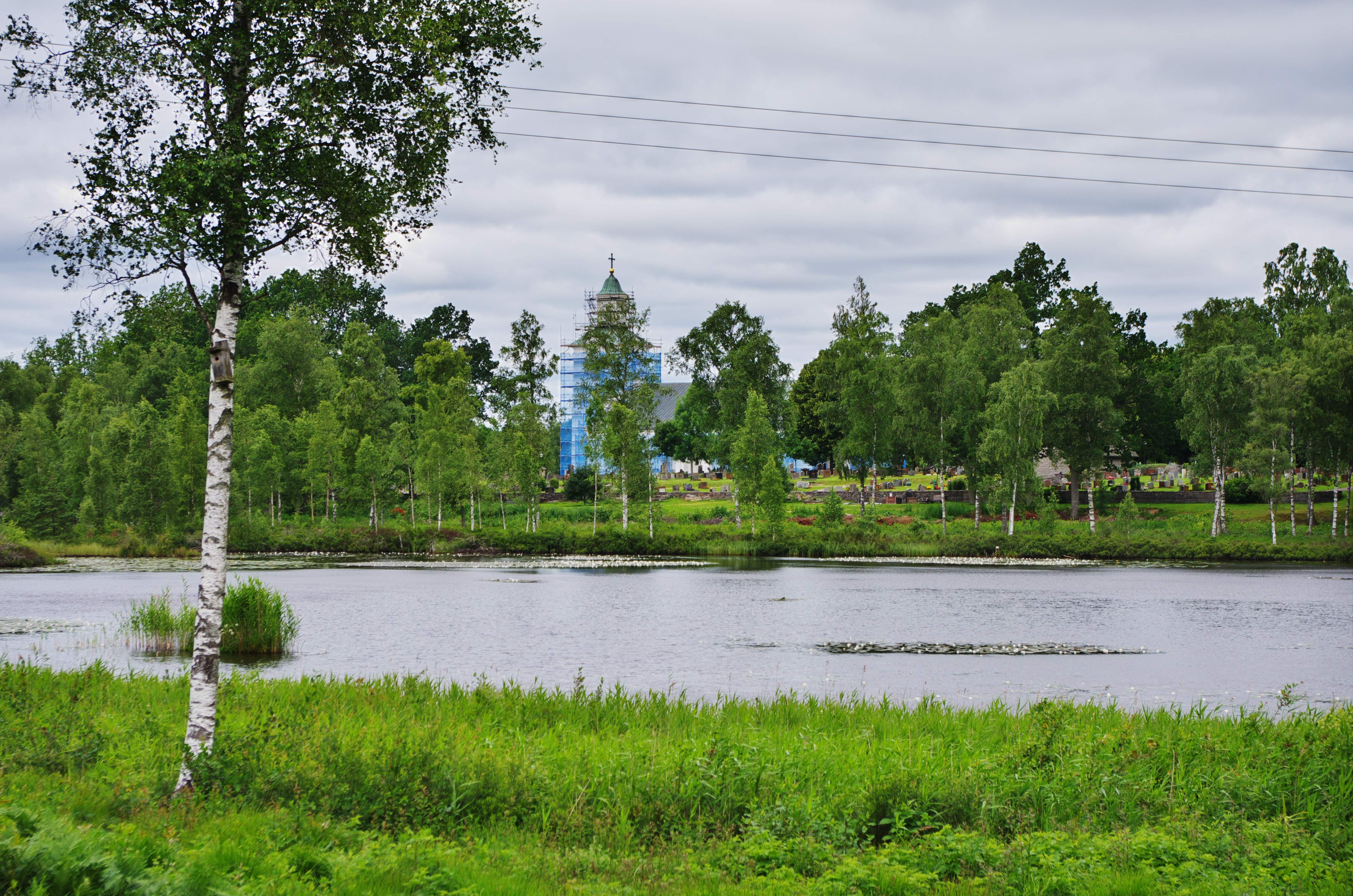 Svartesjön i tätorten Markaryd.